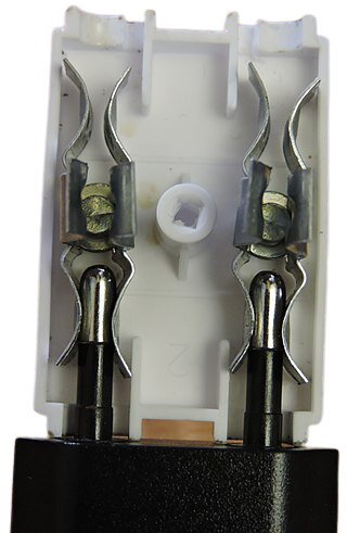 Разобранный электротройник. В него интегрированы металлические пластины, связанные со штырями вилки. В промежуток между скобами и входят контакты вилок